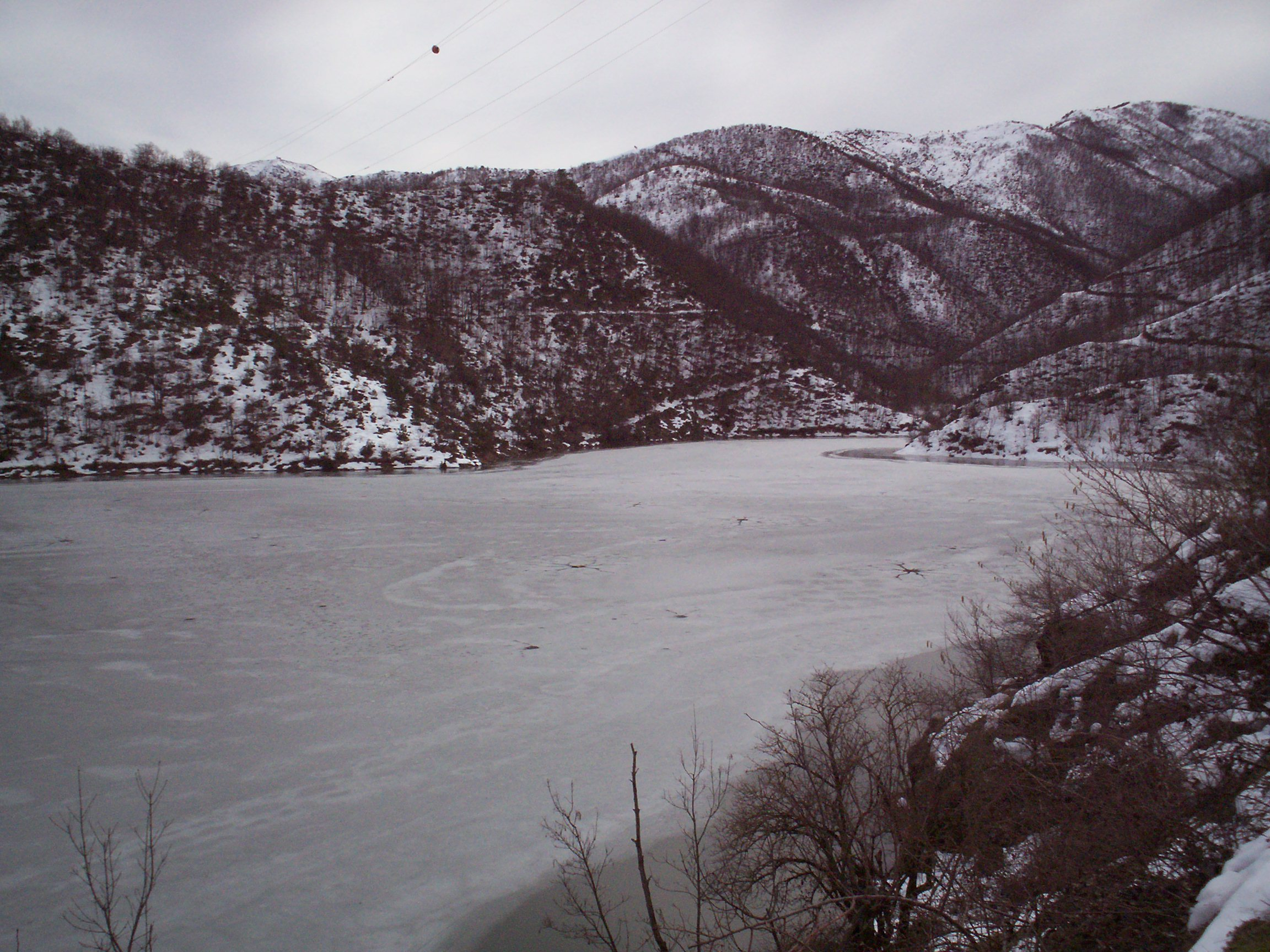 lago inf. della Lavagnina inverno 2010